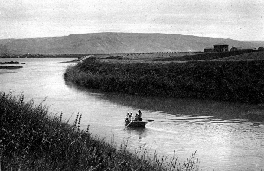 1912 גלויה מצולמת של נרינסקי במוצא הירדן. נראים בתי דגניה. - בן ציון ישראלי